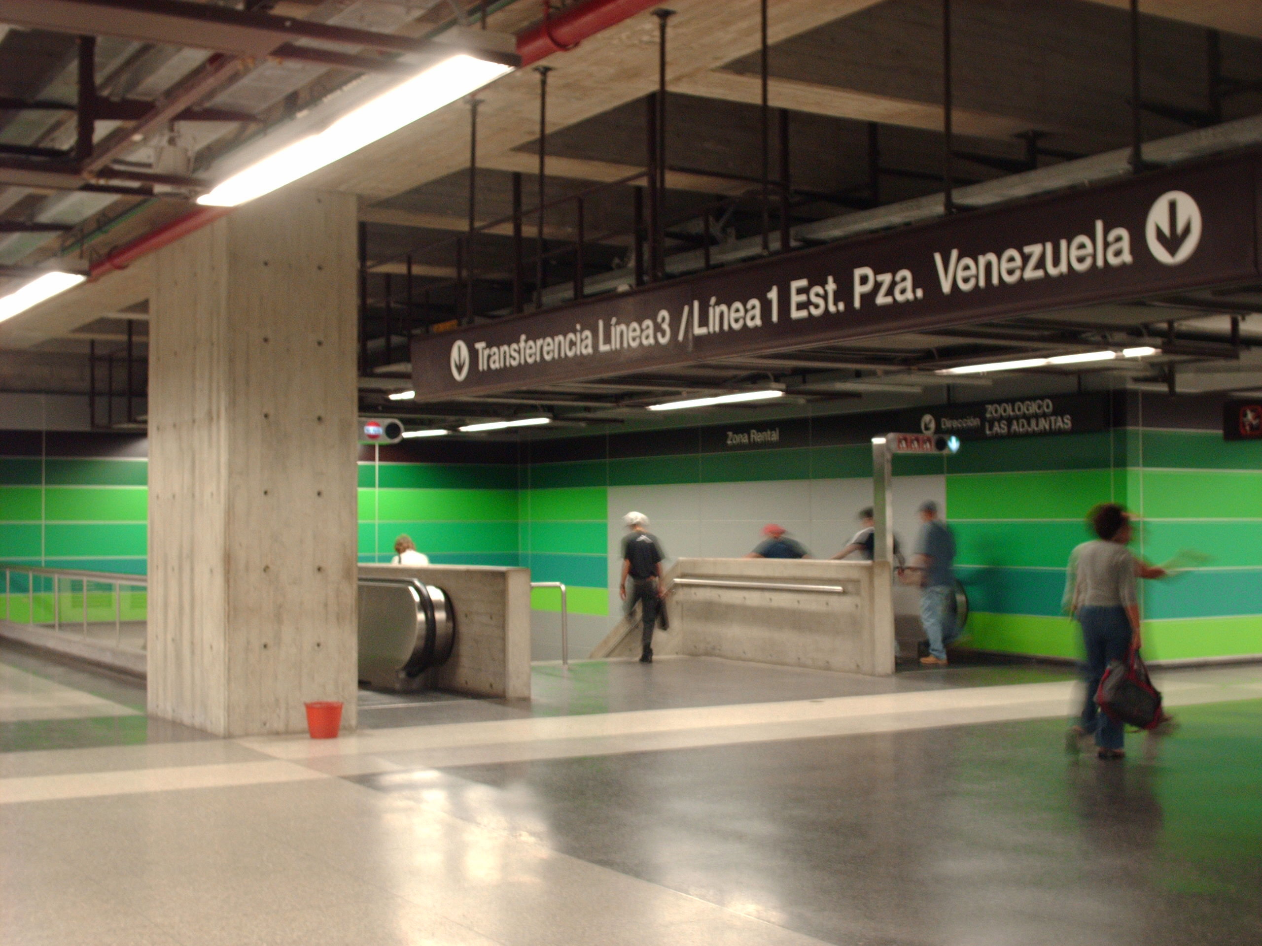 Estación de Zona Rental, transferencia a L1 y L2